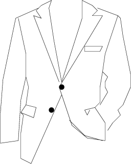 Tecknad bild på enkelknäppt kavaj med två knappar och spestiga slag. Teckning: Arbapp